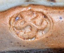 signature, céramiste, Tiffoche, Guérande